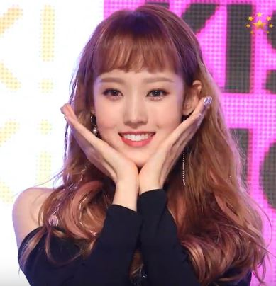 10월 11일 오후 서울 용산구 블루스퀘어에서 첫 번째 싱글 앨범 'KISS, KICKS' 발매 프레스 쇼케이스를 가졌다.